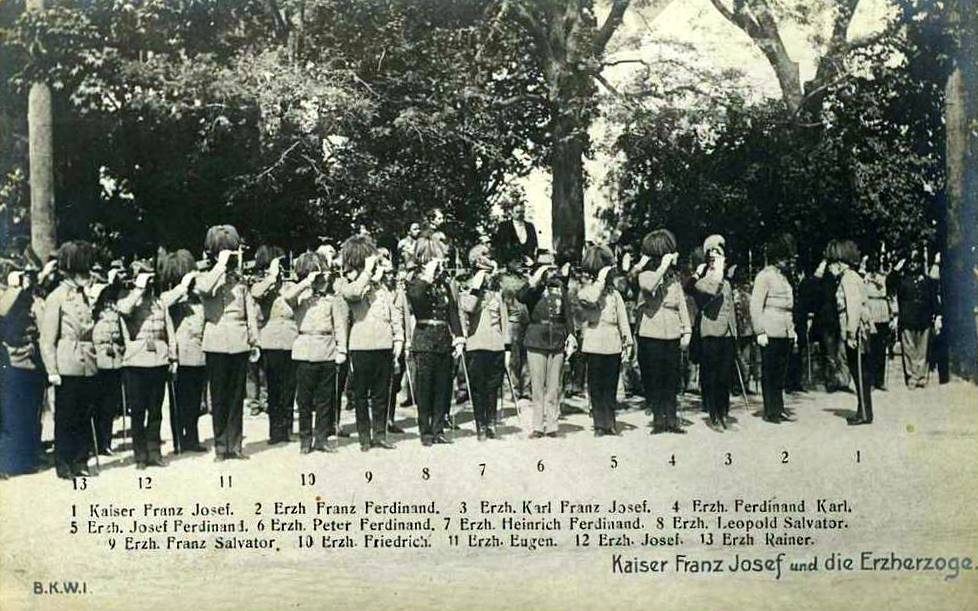 Kaiser Franz Josef I. und die Erzherzöge